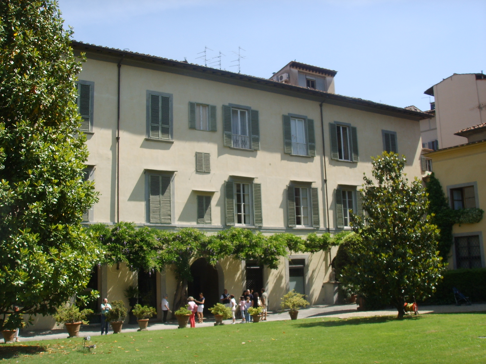 Palazzo dei frescobaldi, back view